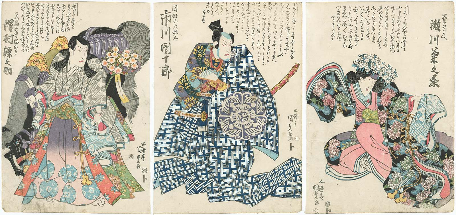 Kabuki Scene from "Ichinotani Futaba Gunki ", Act 2 （『一谷嫩軍記』 二段目より）